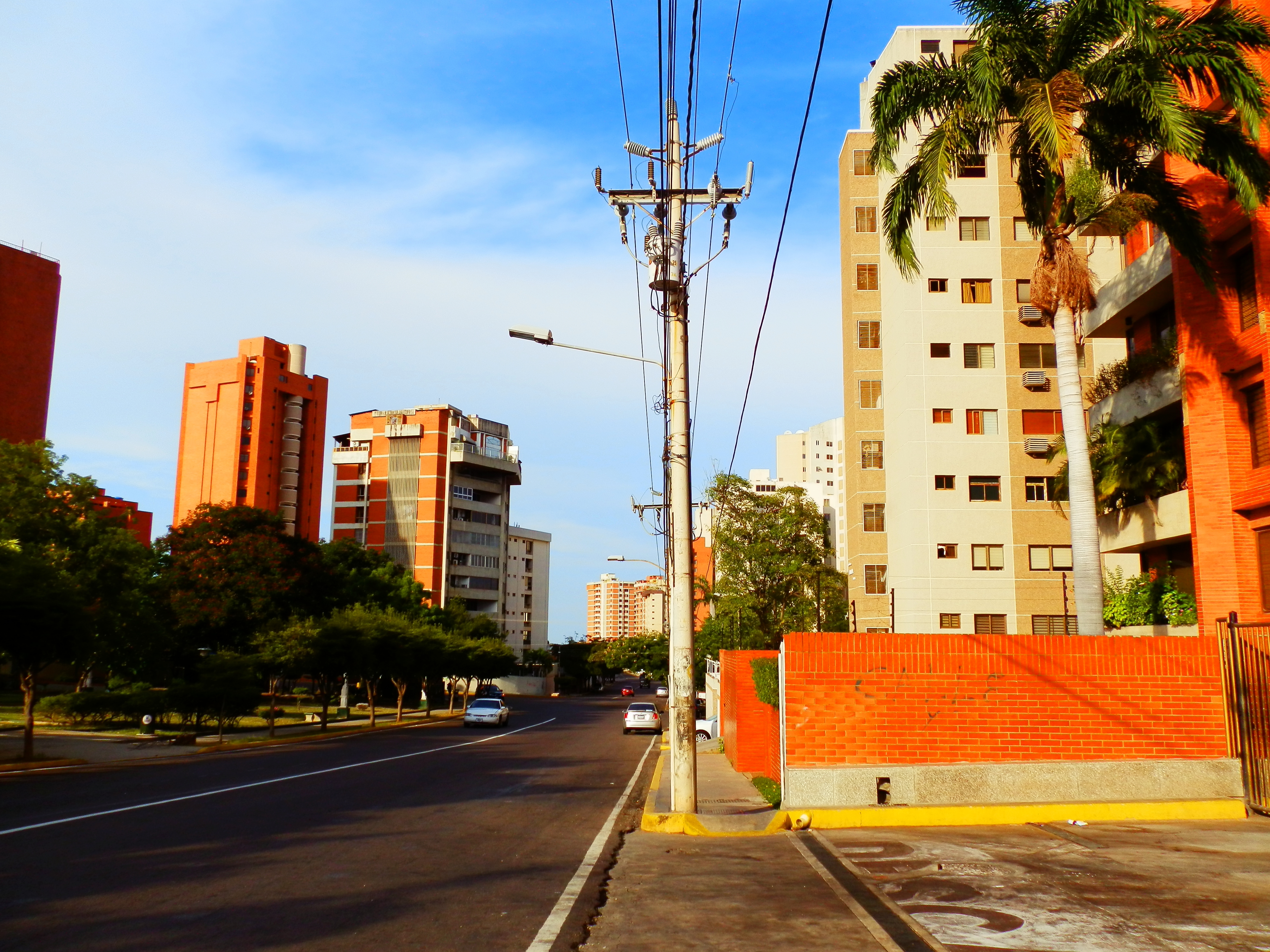 Edificios en Maracaibo, Venezuela